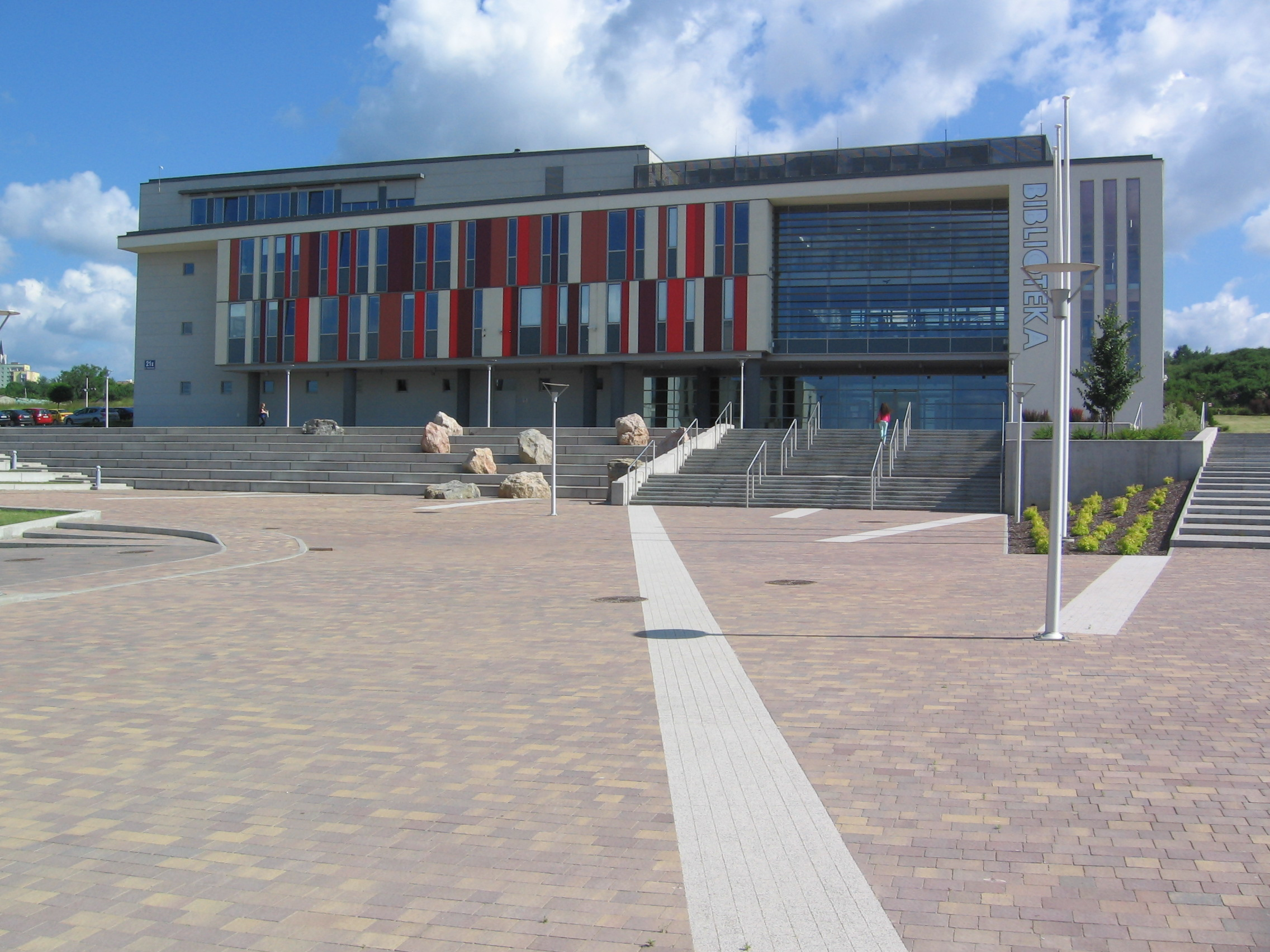 Biblioteka Uniwersytecka w Kielcach przy ul. Świętokrzyskiej 21e. Otwarta w 2013 roku.